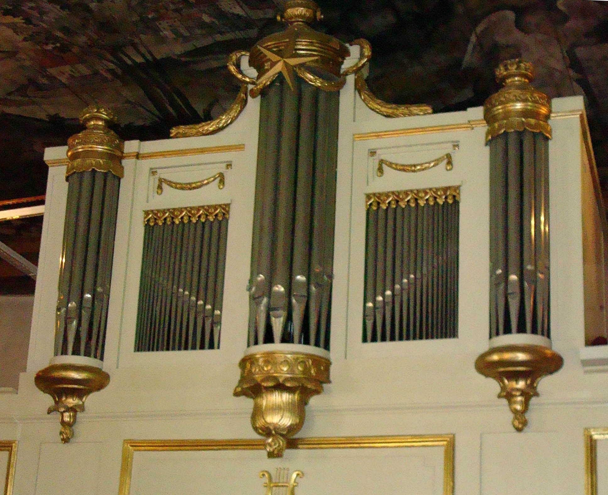 Orgeln i Hakarps kyrka (The organ in church of Hakarp)